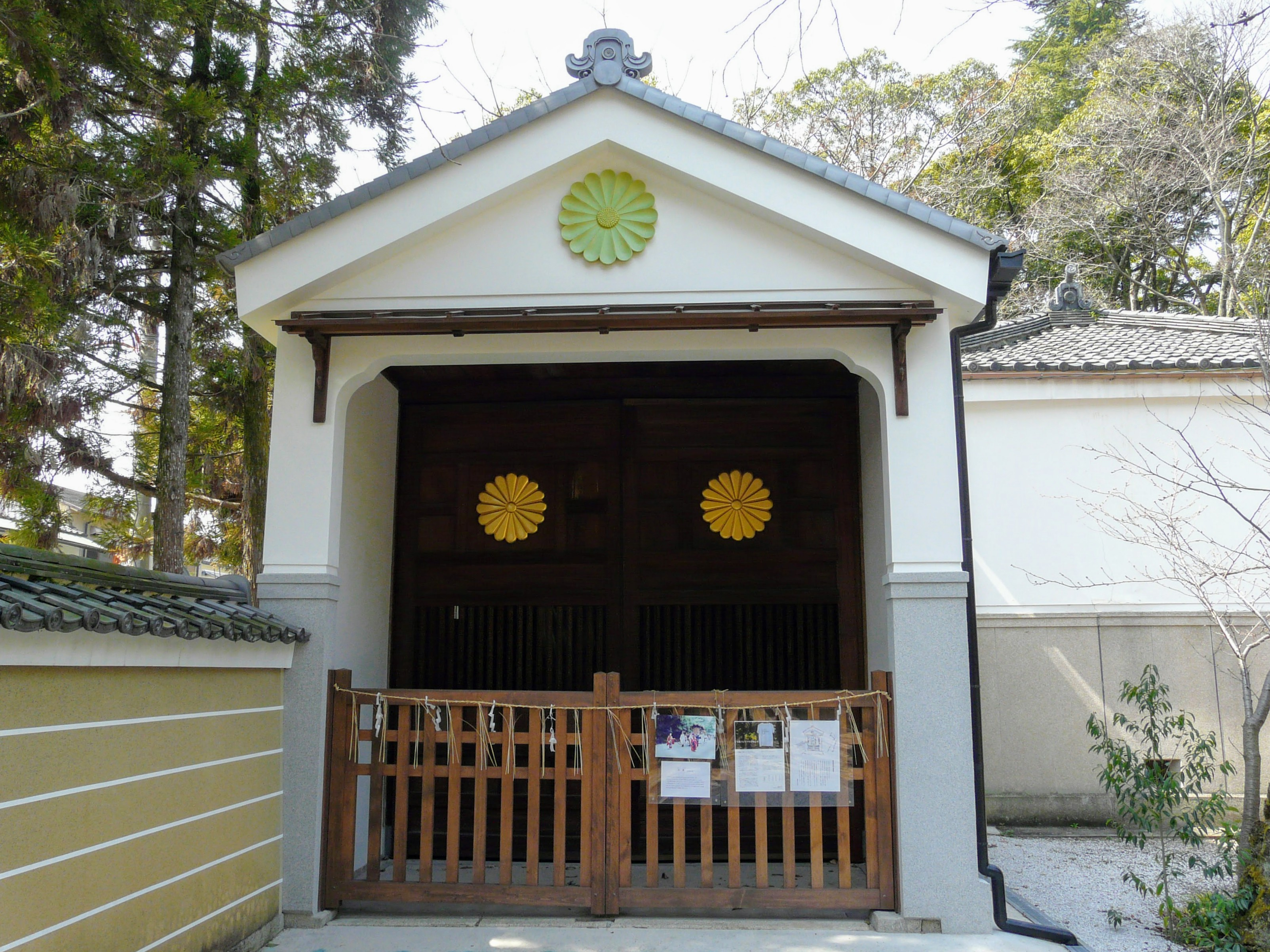 御車社 Panasonic Lumix DMC-FZ18